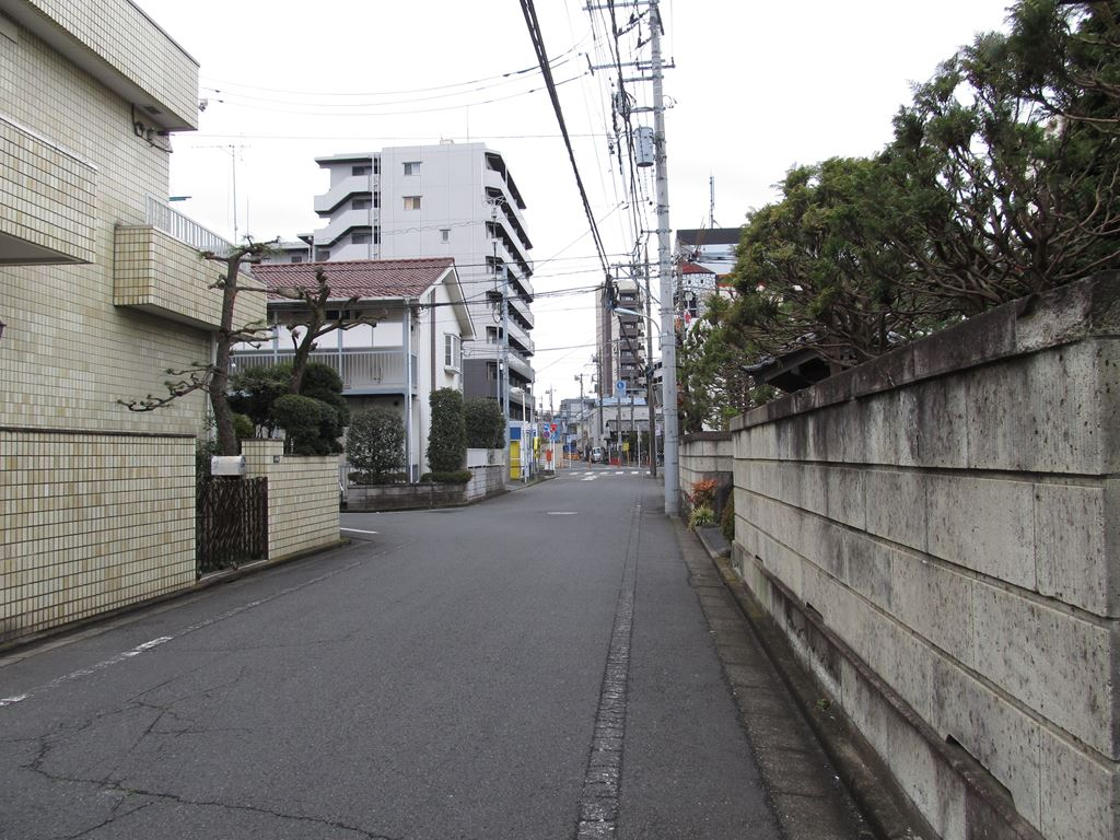 人見街道。基地跡地から出て甲州街道へ向かう部分。